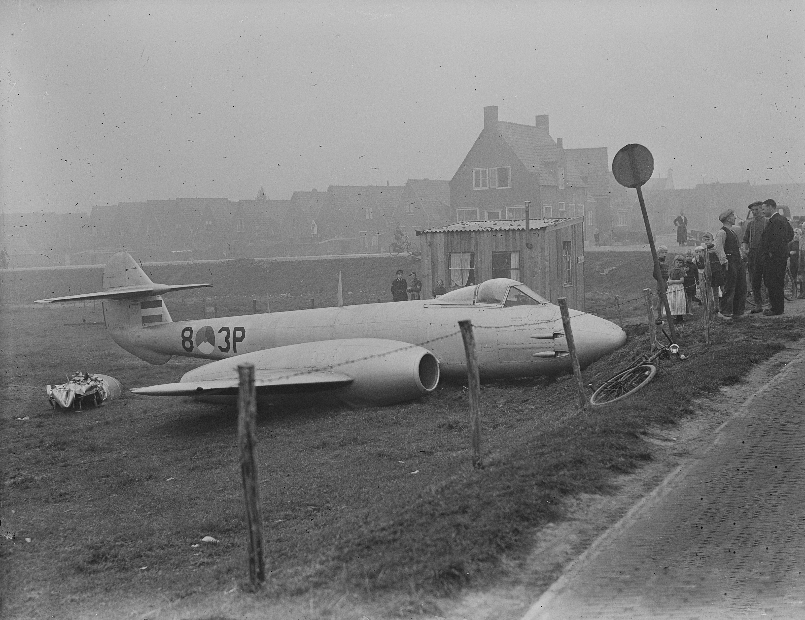 Collectie / Archief : Fotocollectie Anefo Reportage / Serie : [ onbekend ] Beschrijving : Nederlandse Gloster Meteor MK.IV straaljager van de Koninklijke Luchtmacht bij Volendam verongelukt cq noodlanding gemaakt. Datum : 28 september 1949 Locatie : Noord-Holland, Volendam Trefwoorden : luchtmacht, luchtvaart, ongevallen, vliegtuigen Instellingsnaam : Koninklijke Luchtmacht Fotograaf : Noske, J.D. / Anefo Auteursrechthebbende : Nationaal Archief Materiaalsoort : Glasnegatief Nummer archiefinventaris : bekijk toegang 2.24.01.09 Bestanddeelnummer : 903-6315